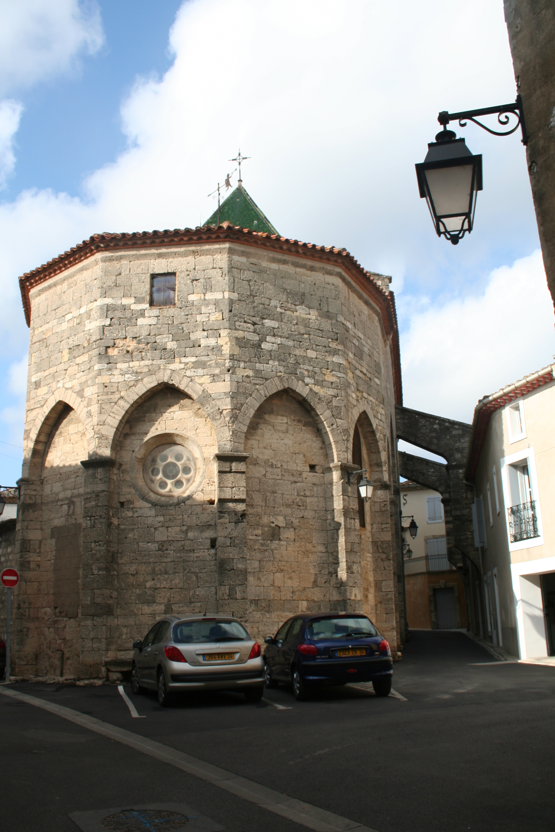 Saint-Geniès-de-Fontedit (Hérault) - chevet de l'église Saint-Geniès.